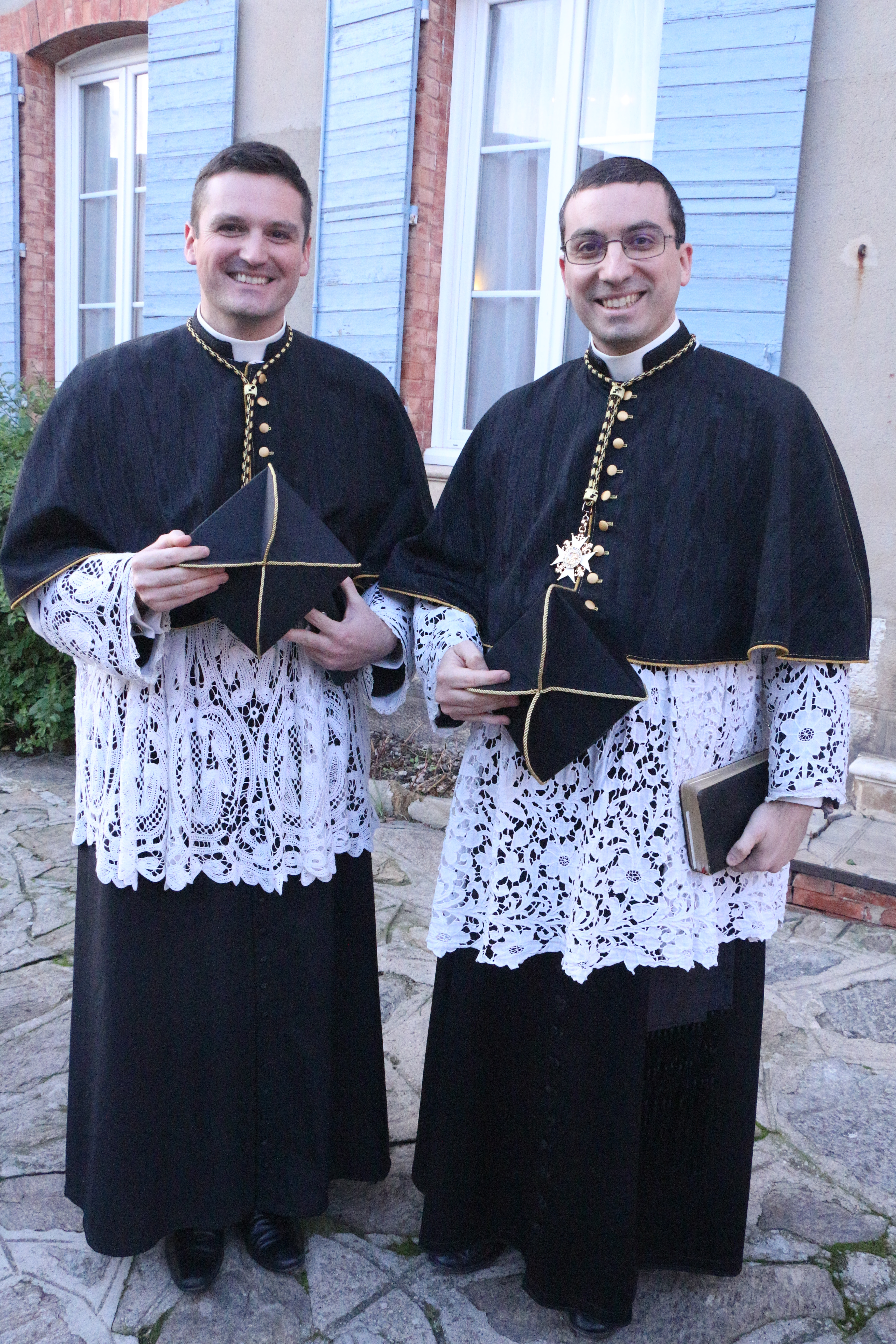 Les chanoines Sébastien et Frédéric Goupil, fondateurs du Chapitre de Saint-Remi.